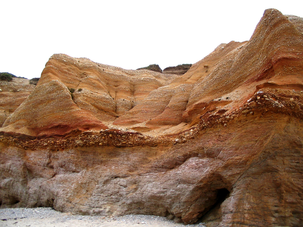 les différents niveaux du dépôt fluviatile de la falaise de pénestin, bretagne, F